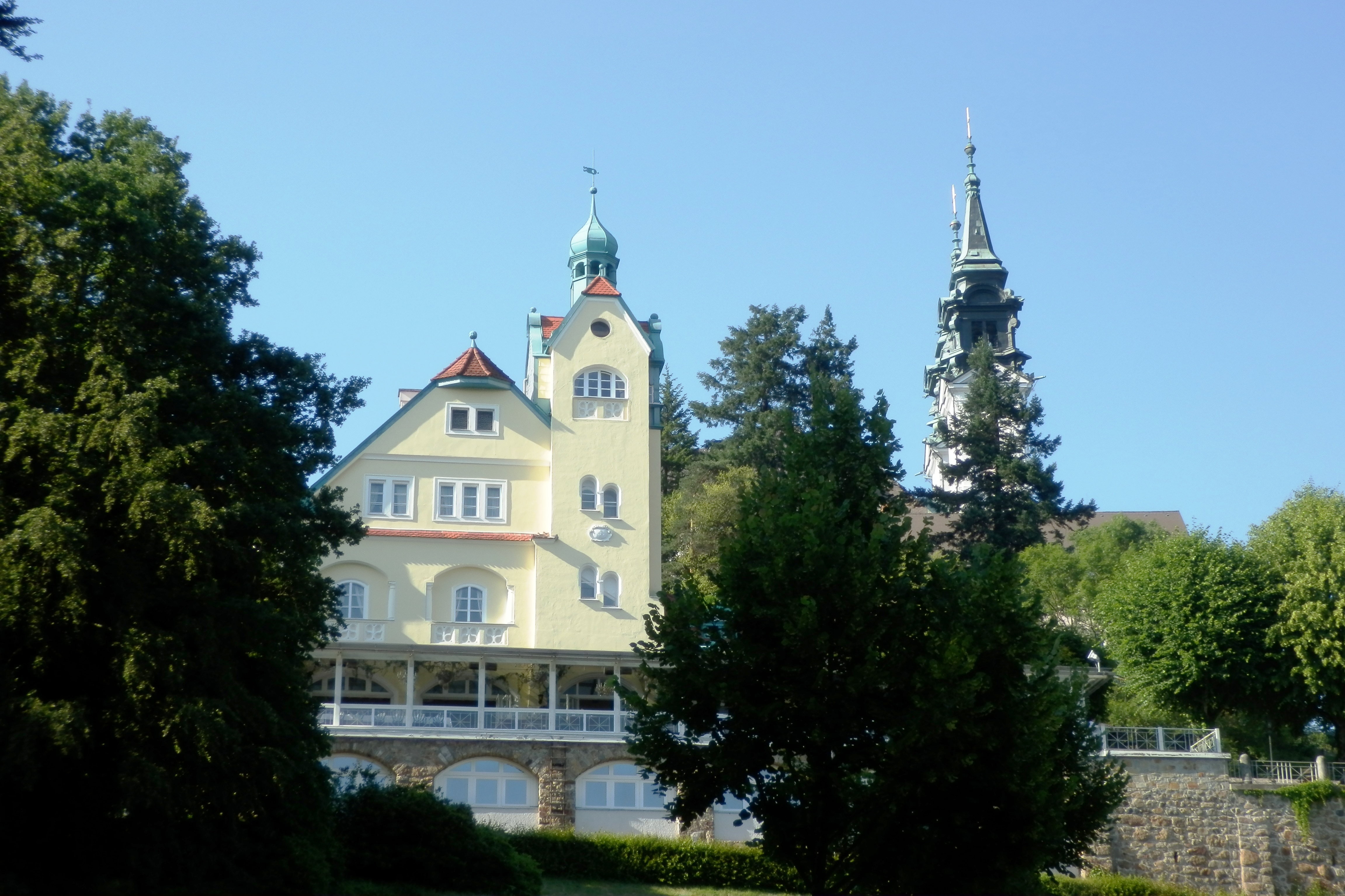 Pöstlingbergschlössl Linz